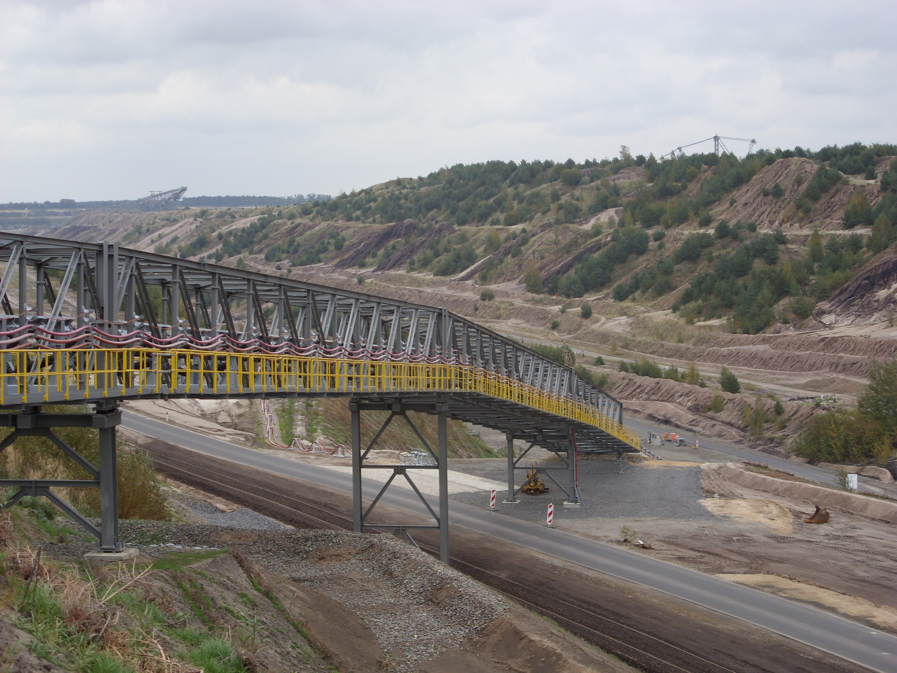 Förderanlage des Tagebaus Reichwalde im Bau (2009). Hornjoserbsce: Přewozna připrawa Rychwałdskeje jamy za čas twarjenja w lěće 2009.